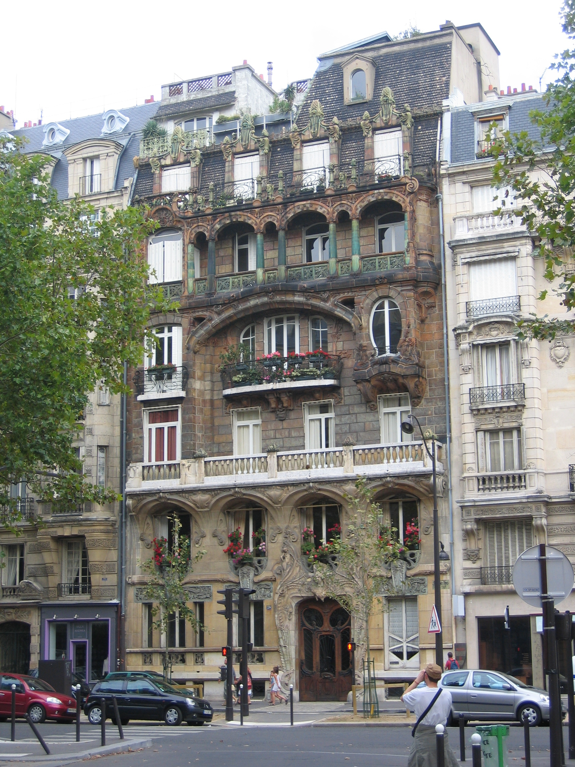 Immeuble Lavirotte, 29 avenue Rapp, Paris 7e